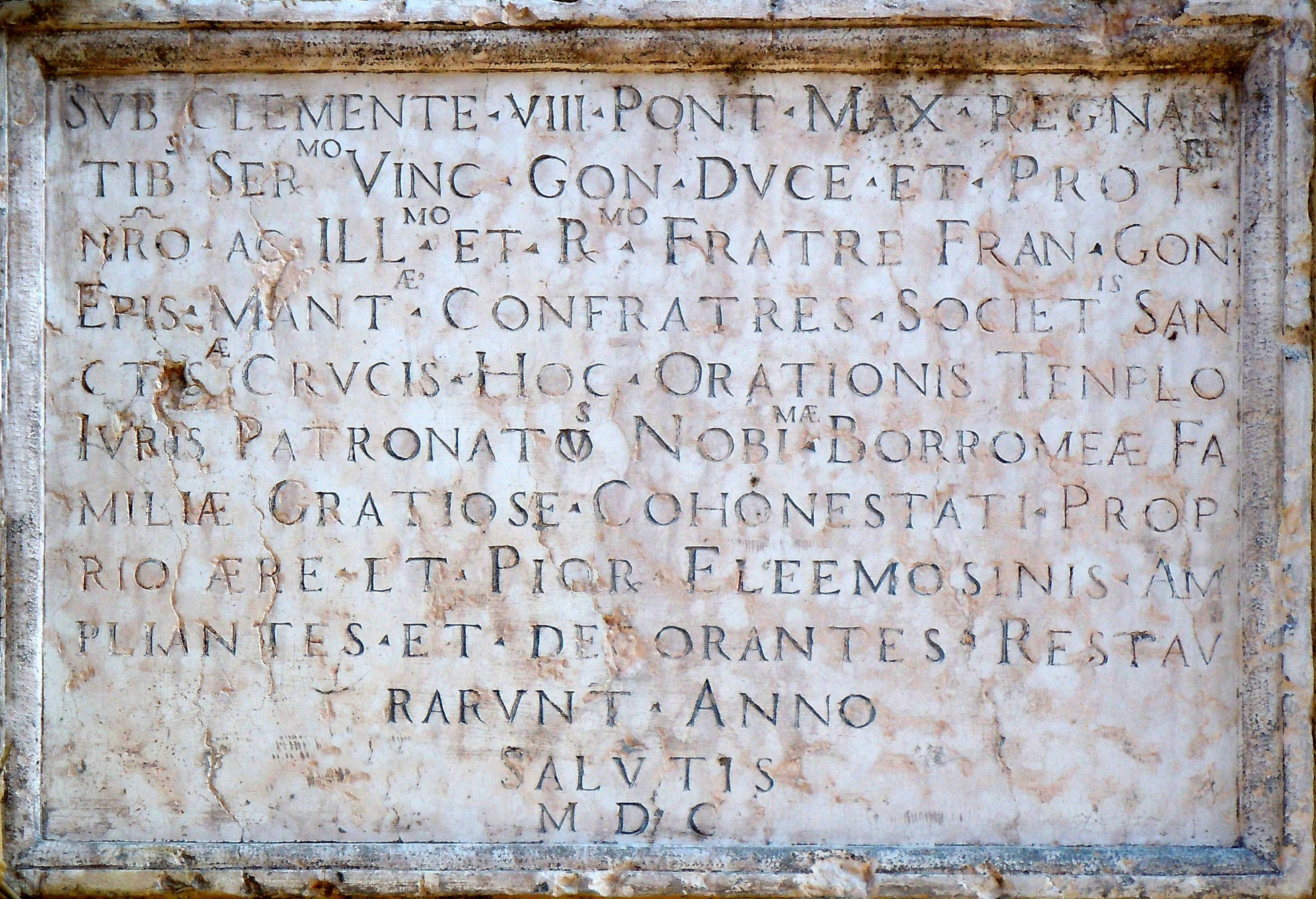 Mantova, lapide posta sulla facciata dell'ex Oratorio di Santa Maria del Melone.